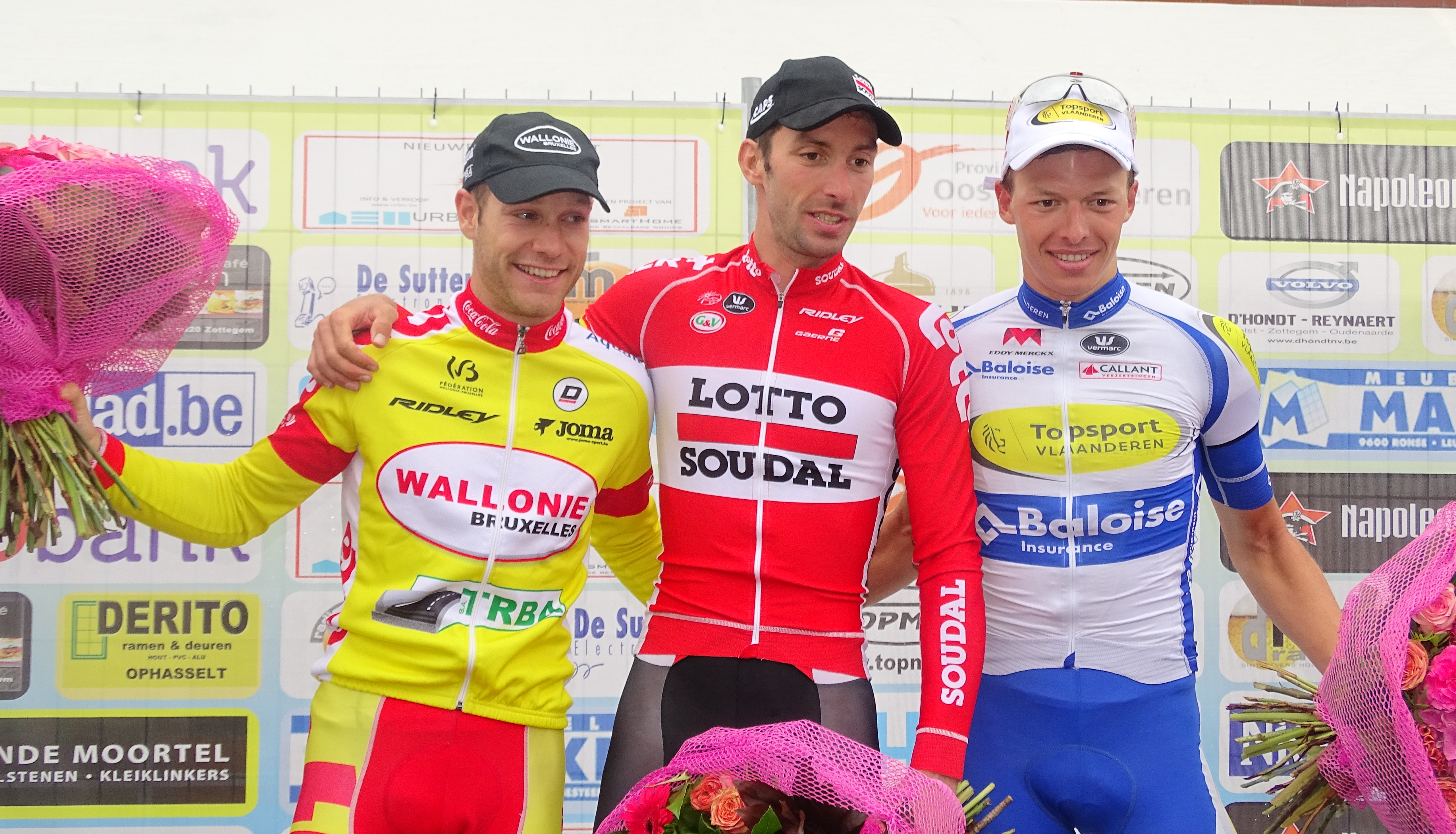 Reportage réalisé le mardi 18 août à l'occasion du départ et de l'arrivée du Grand Prix de la ville de Zottegem 2015 à Zottegem, Belgique.